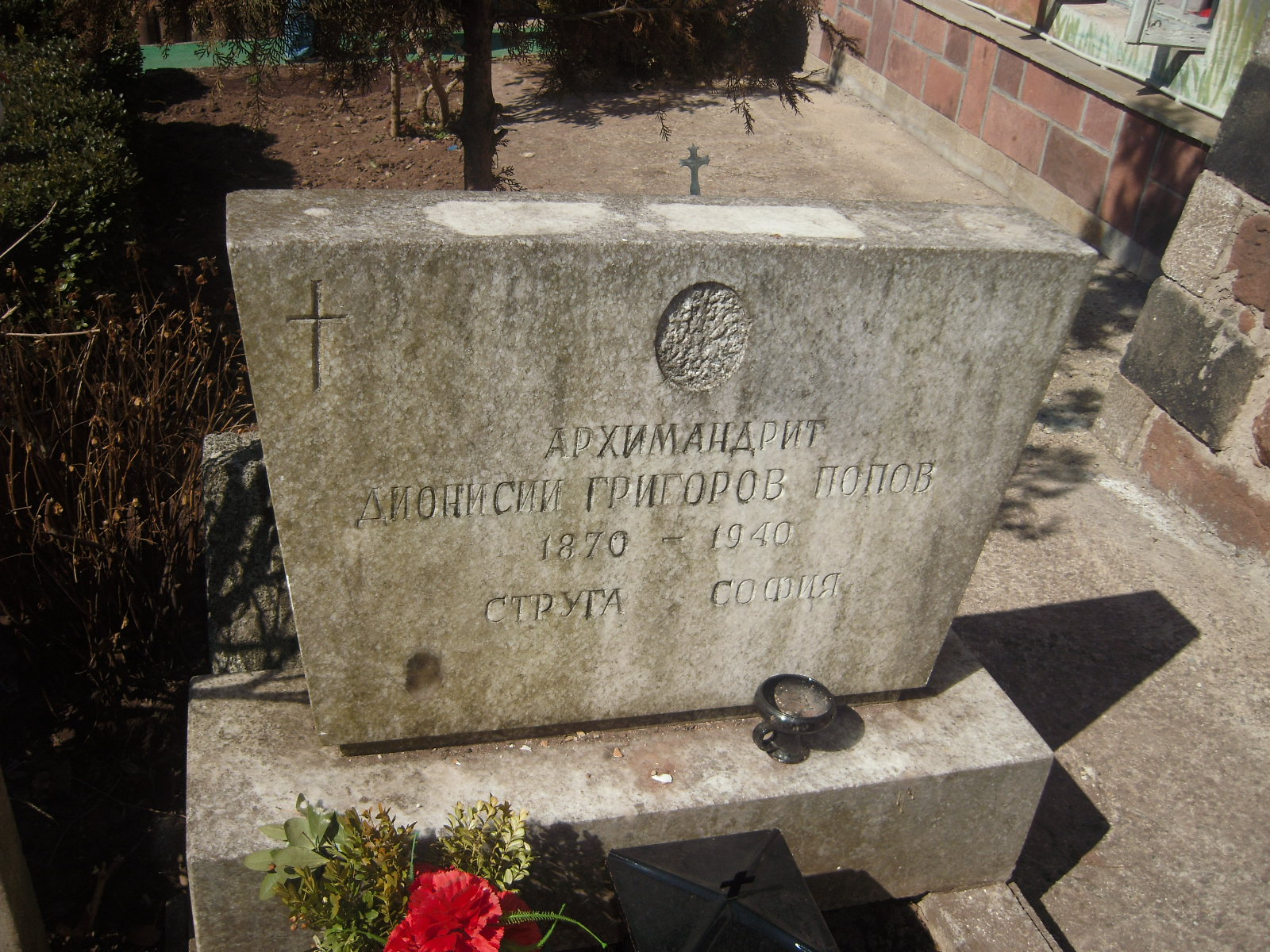 Гробът на отец Дионисий Поповски в Курилския манастир, Курило, България.